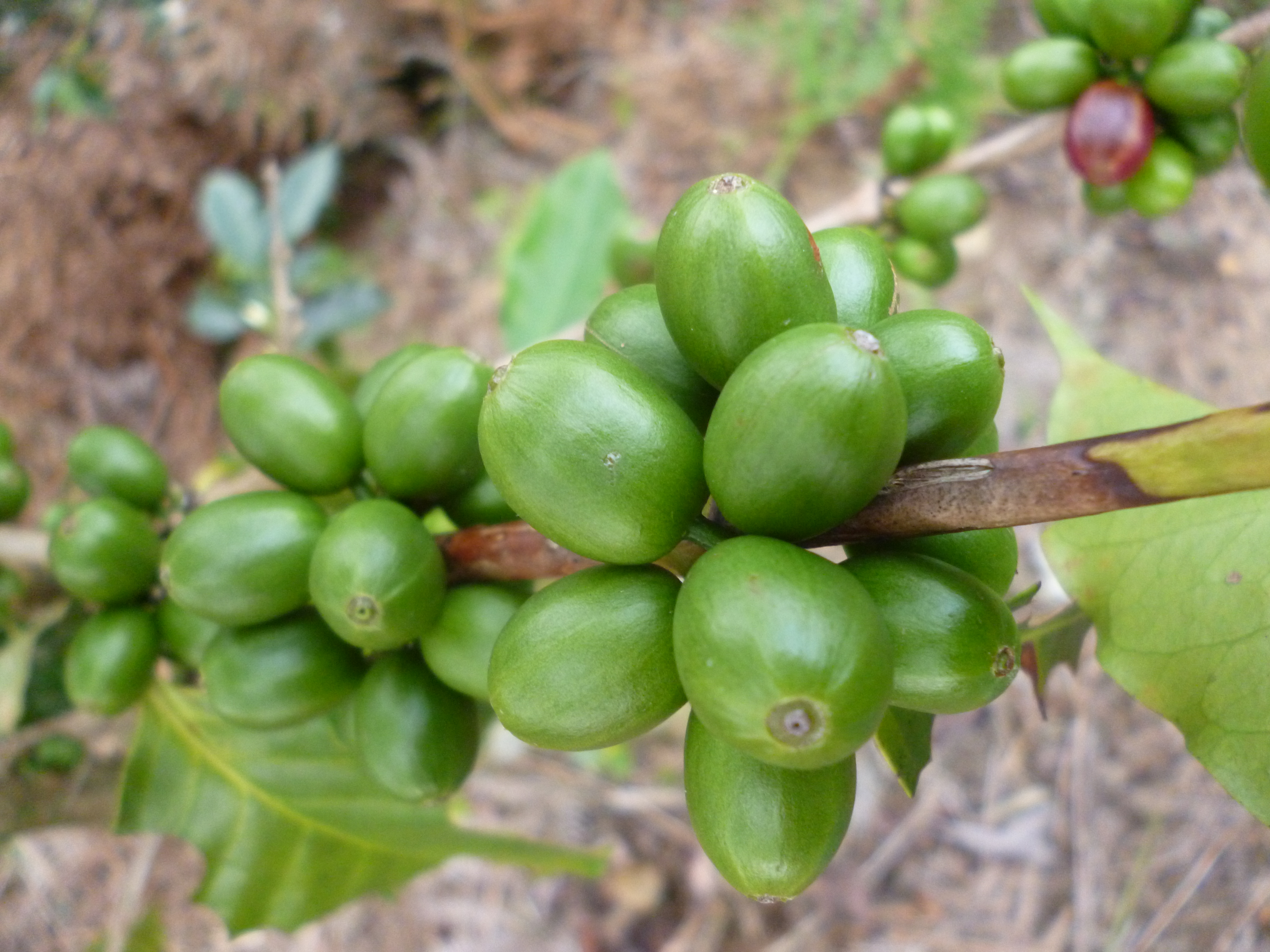 Frutas verdes de café caturro-arabica en San Roque Colombia